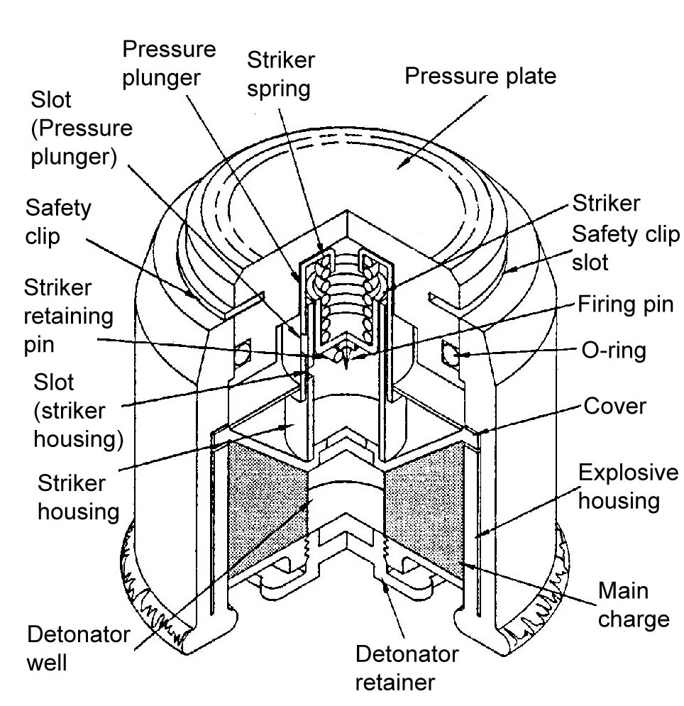 MD82 mine cutaway